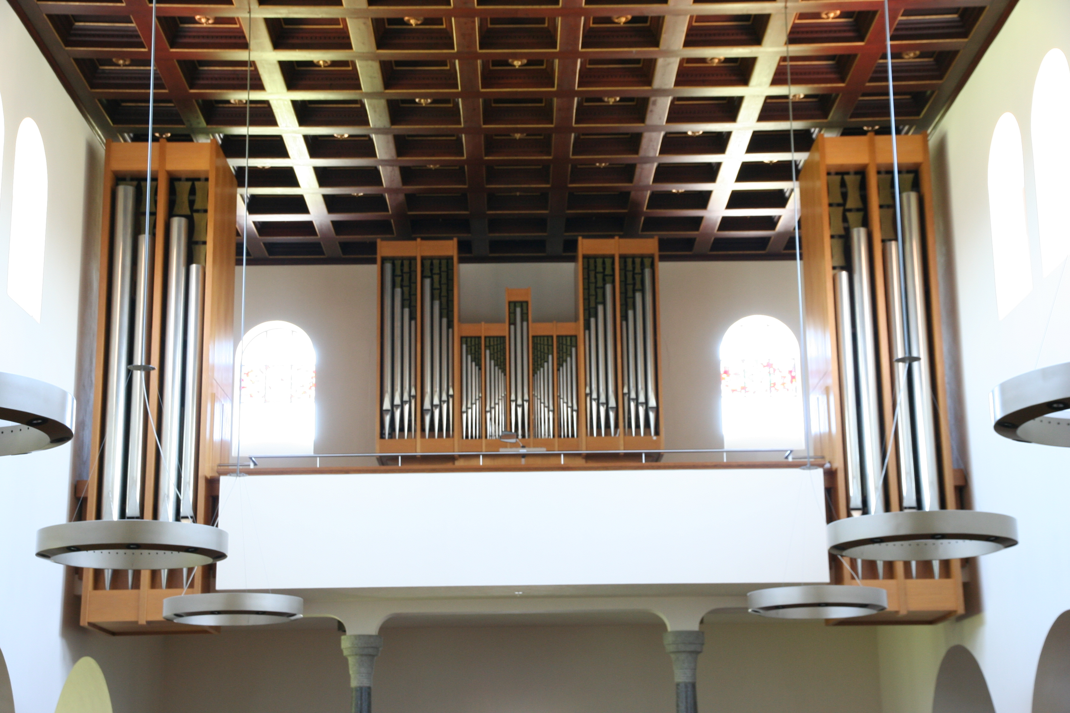 Römisch-katholische Pfarrkirche St. Franziskus Wetzikon